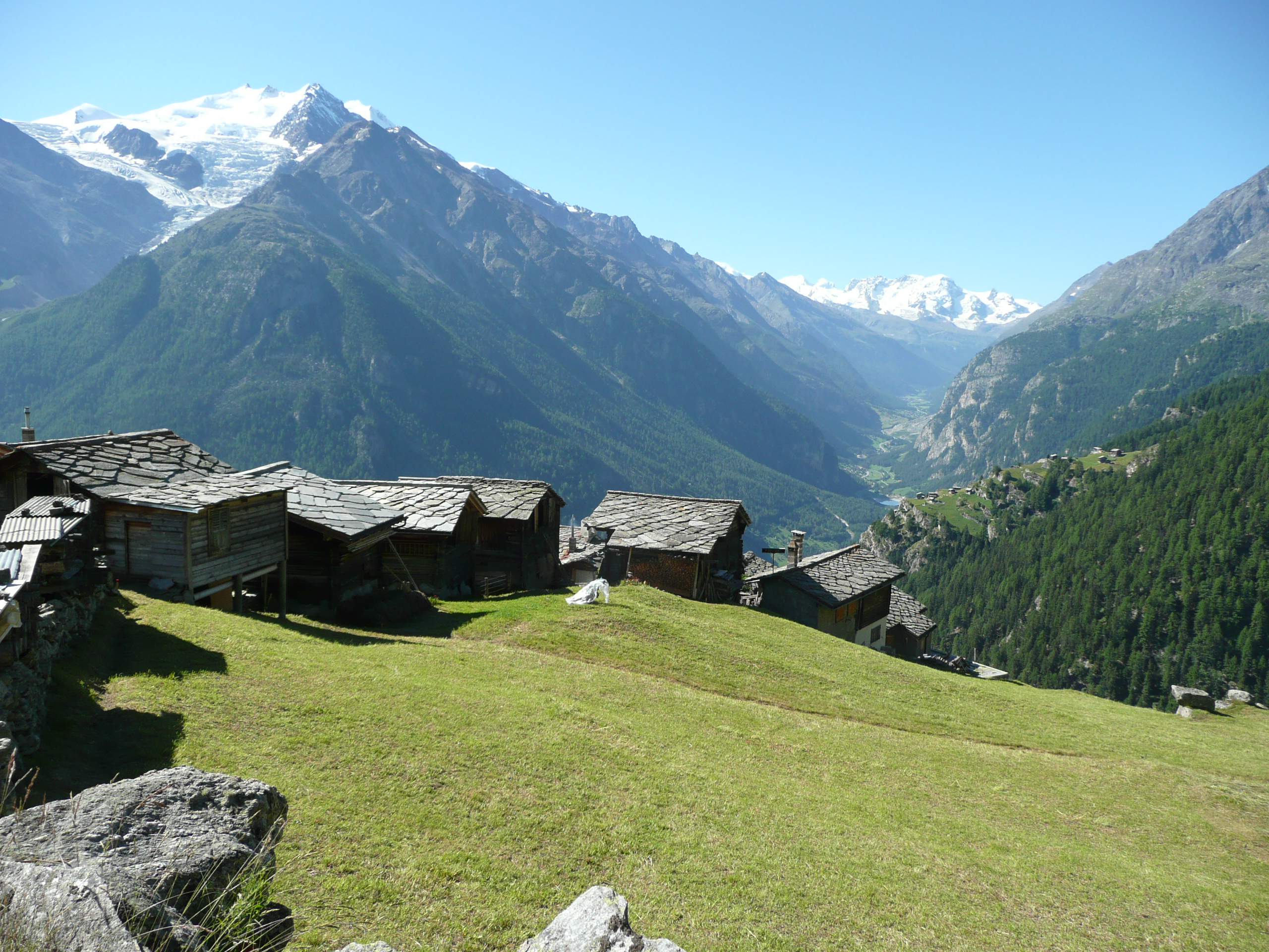 Blick von Jungen ins Mattertal mit Riedgletscher, Klein Matterhorn und Breithorn.